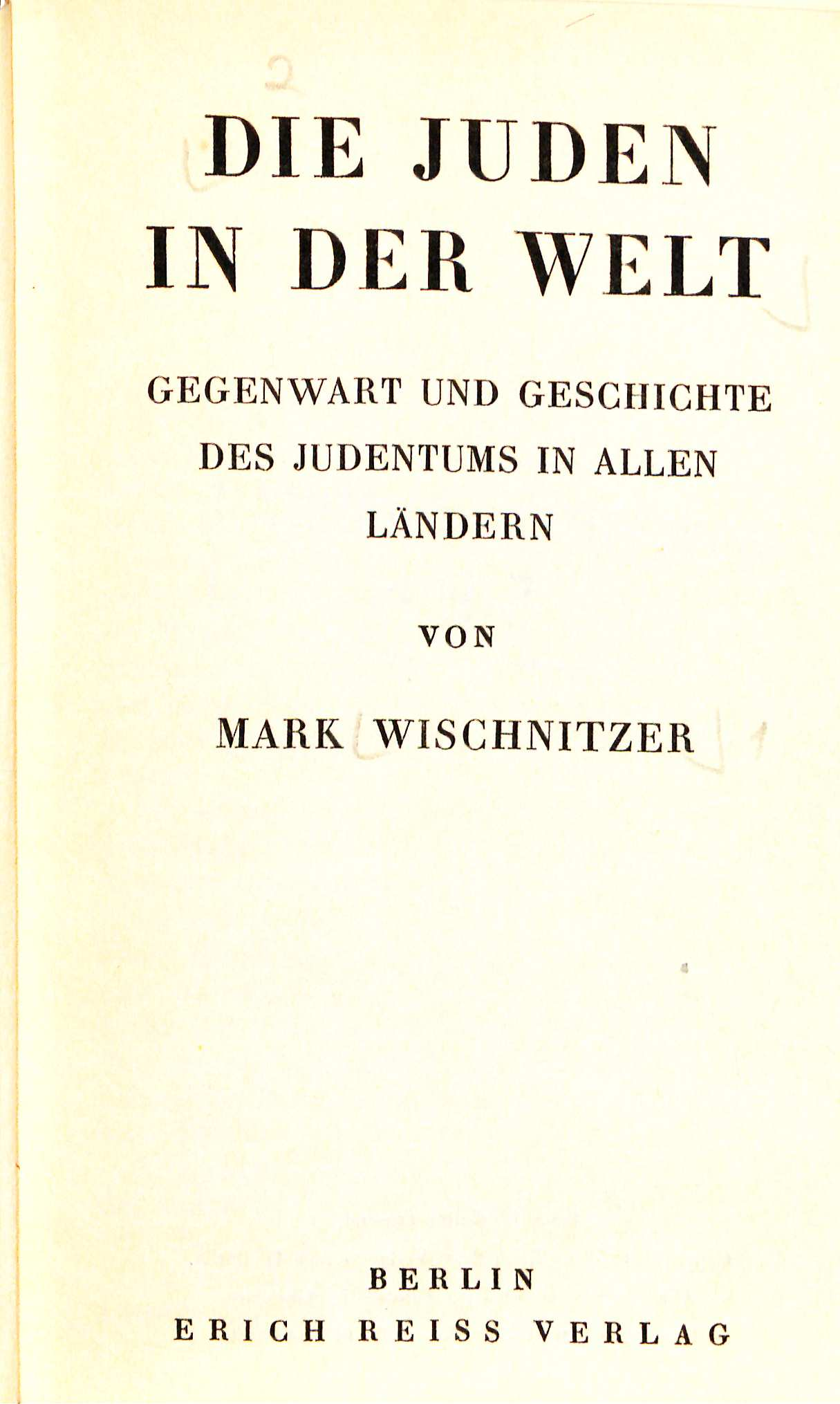 Mark Wischnitzer: Die Juden in der Welt. Reiss : Berlin 1935